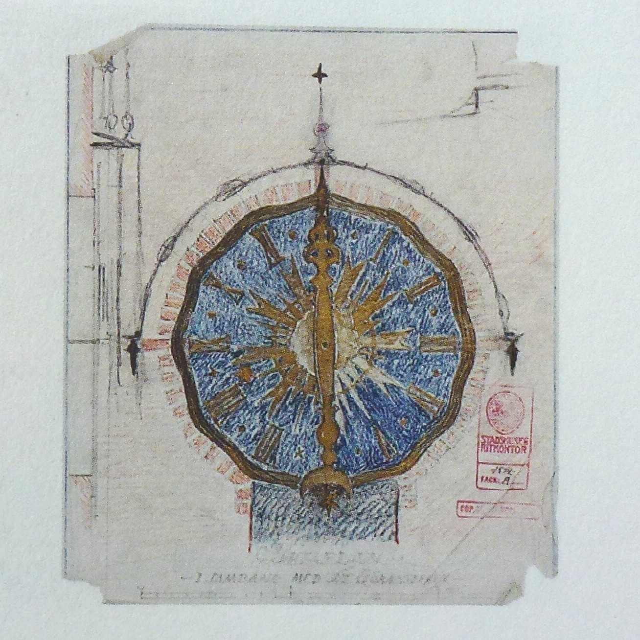 Stockholms stadshus tornur skiss av Johan G. Linderoth